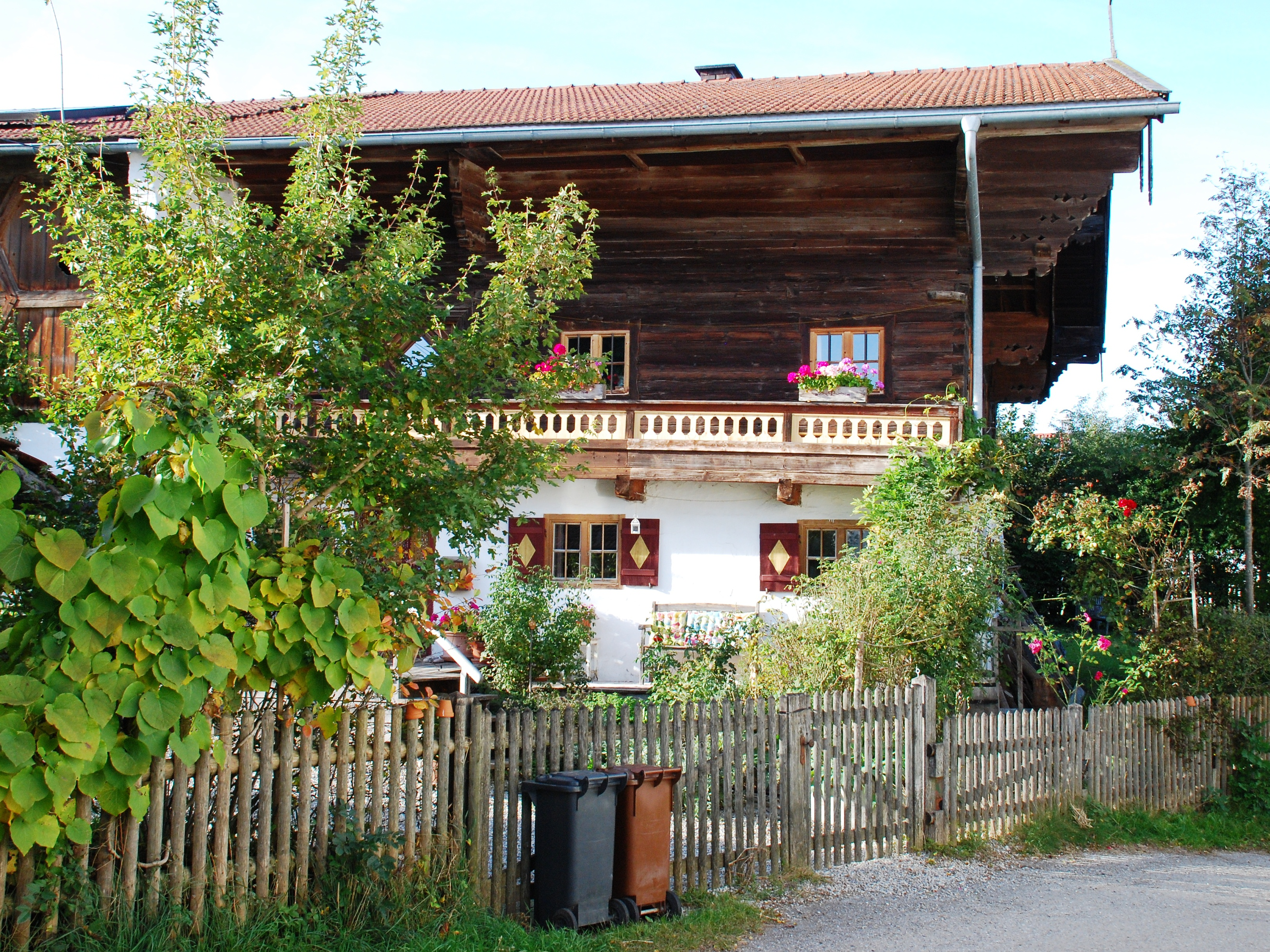 Bauernhof "Beim Jackl" in Graß, Ortsteil von Aying, Landkreis München, Regierungsbezirk Oberbayern, Bayern. Als Baudenkmal unter Aktennummer D-1-84-137-30 in der Bayerischen Denkmalliste aufgeführt. Bild gemäß den Vorgaben zur Panoramafreiheit von öffentlichem Verkehrsgrund aus aufgenommen.